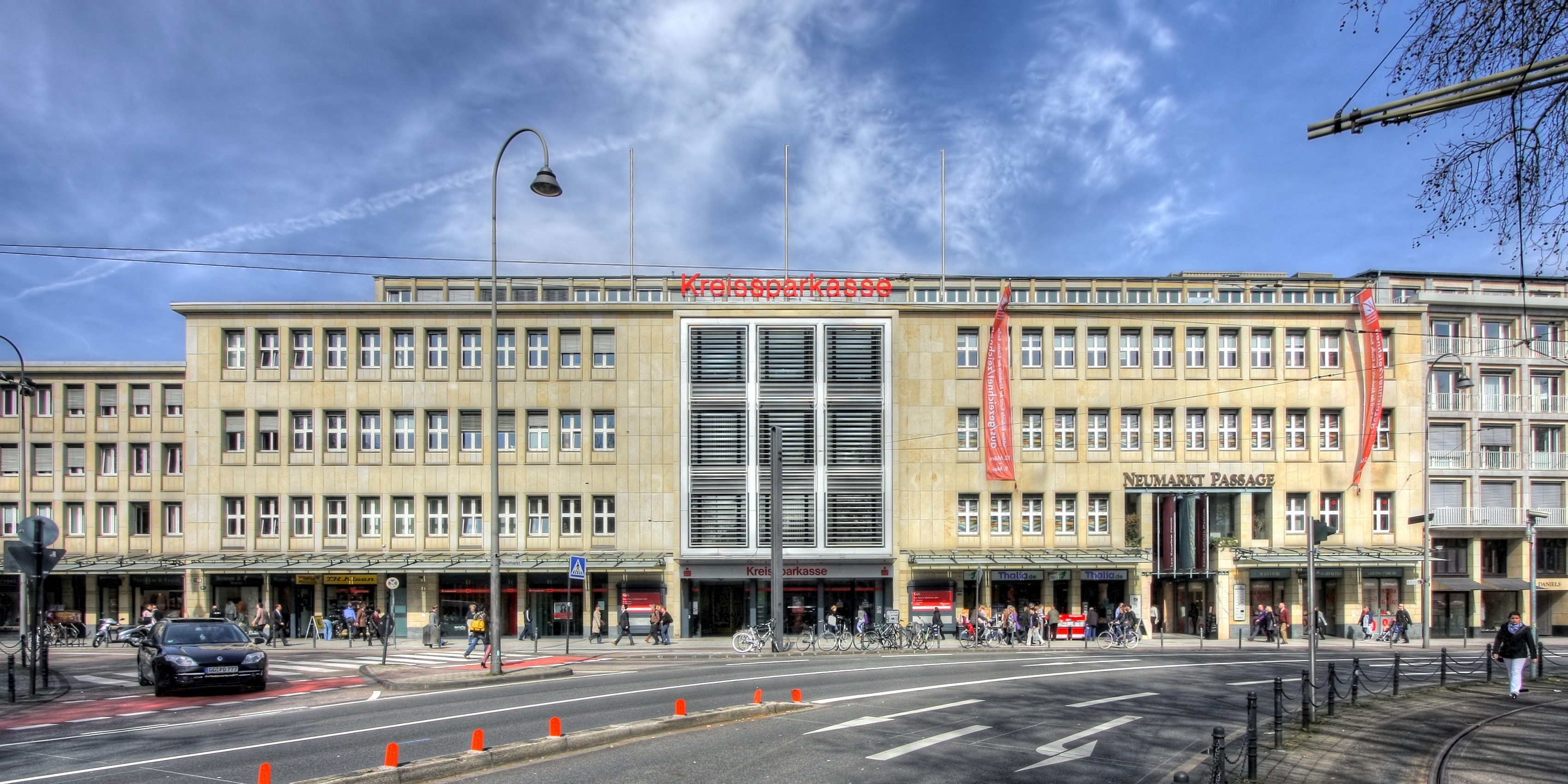 Gesamtansicht des Gebäudes der Kreissparkasse Köln am Neumarkt in Köln. Architekt: Walter Dietz, errichtet: 1948-53